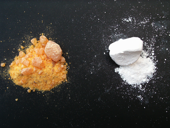 Enkele pofsoorten bij klimmen: links hars, rechts: magnesiumcarbonaat